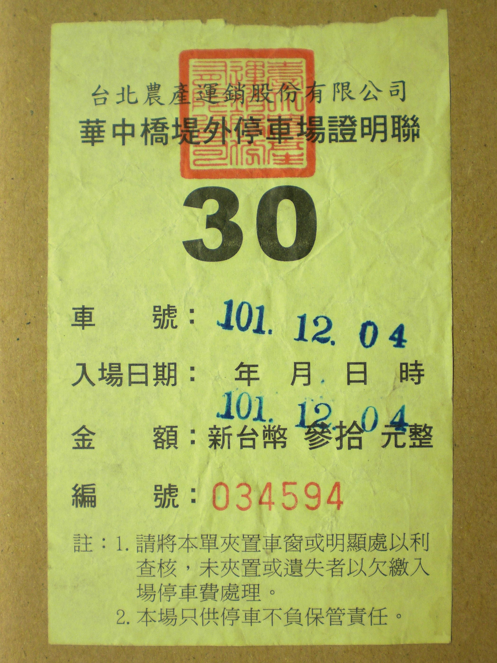 2012年12月4日的台北農產運銷公司華中橋堤外停車場(位於台北市萬華區華中橋下)證明聯新台幣30元版